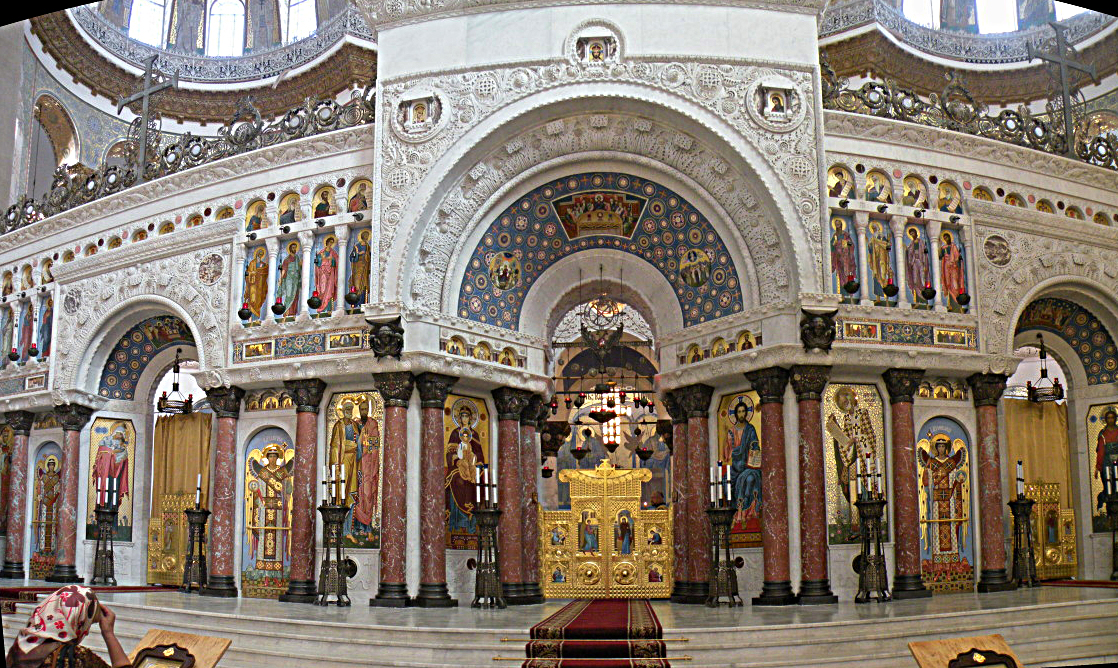 Marine_Nicolaus_kathedral_altar.Kronstadt